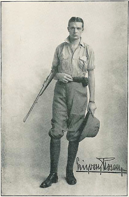 Eric von Rosen i tropikkläder och med bössa